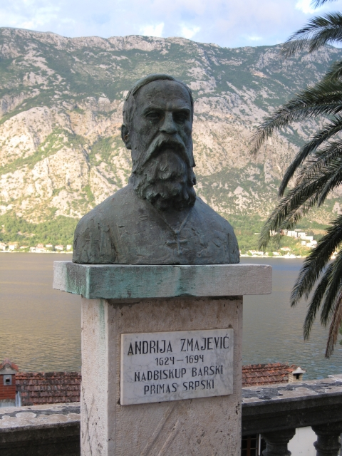 Фотография бюста, перед собором города Прчань (Черногория).